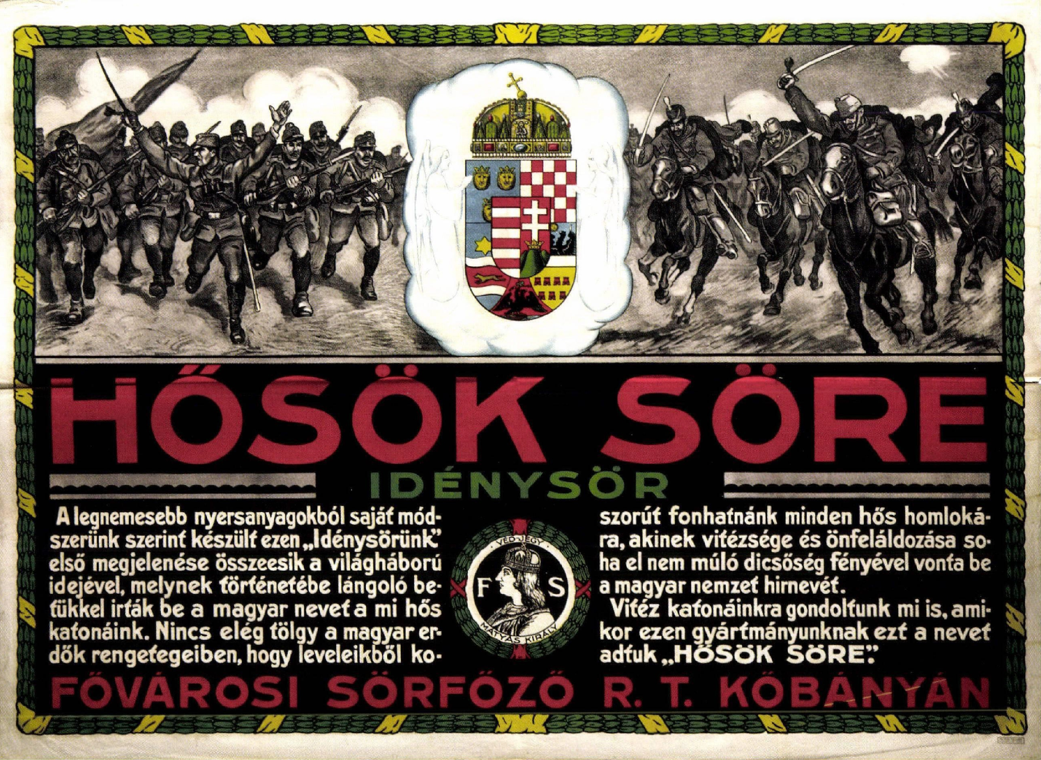 Heroes' Beer Season Beer (poster)